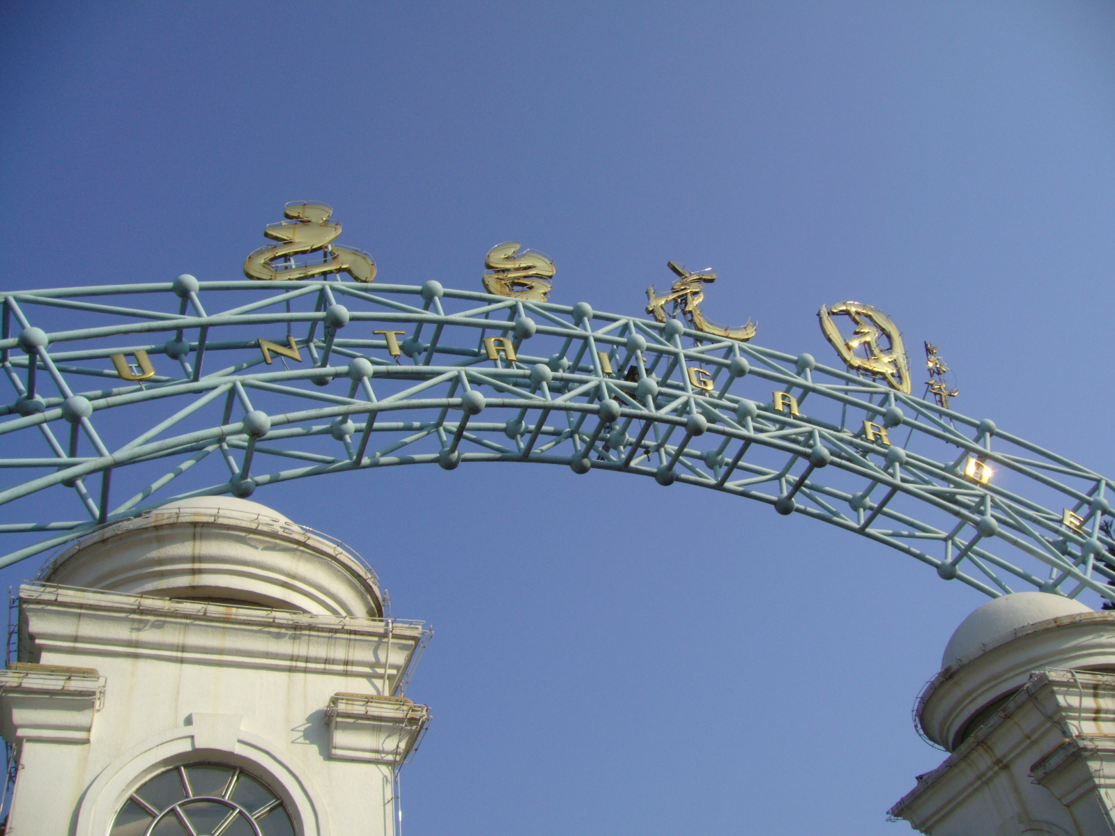 廣州市白雲山雲台花園